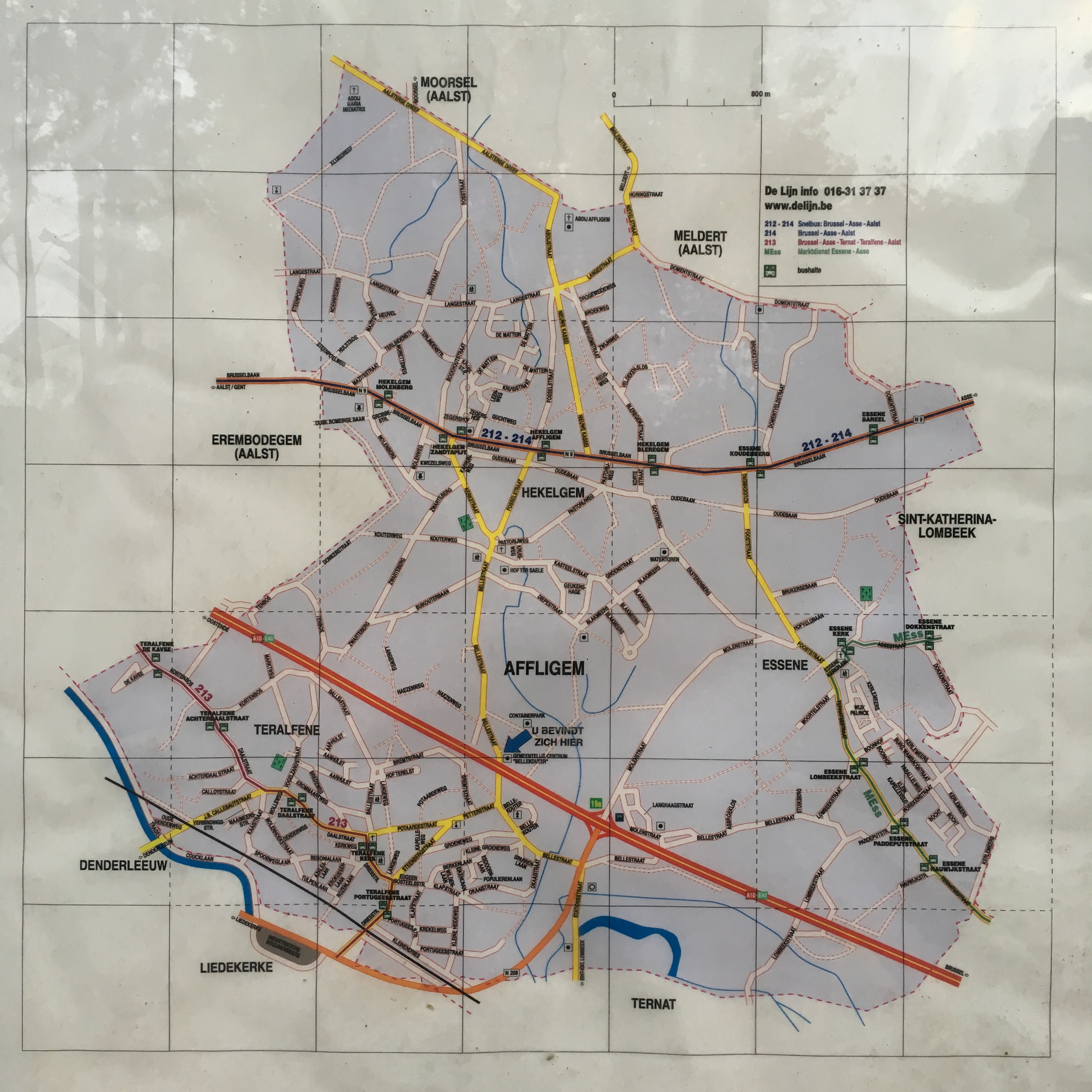 Openbaar stratenplan nabij de Bellekoutersite in Affligem